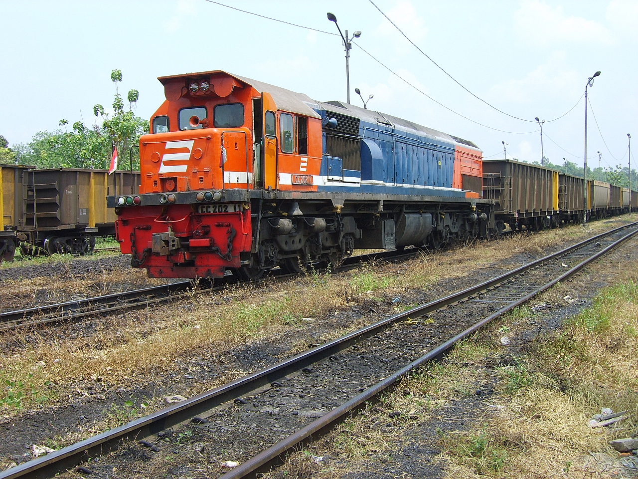 Ptkacc202 (202 11 A)